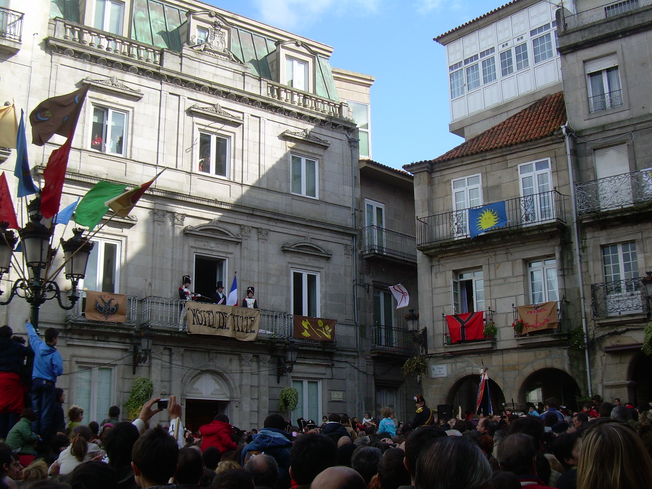 Festa da Reconquista de Vigo 2006